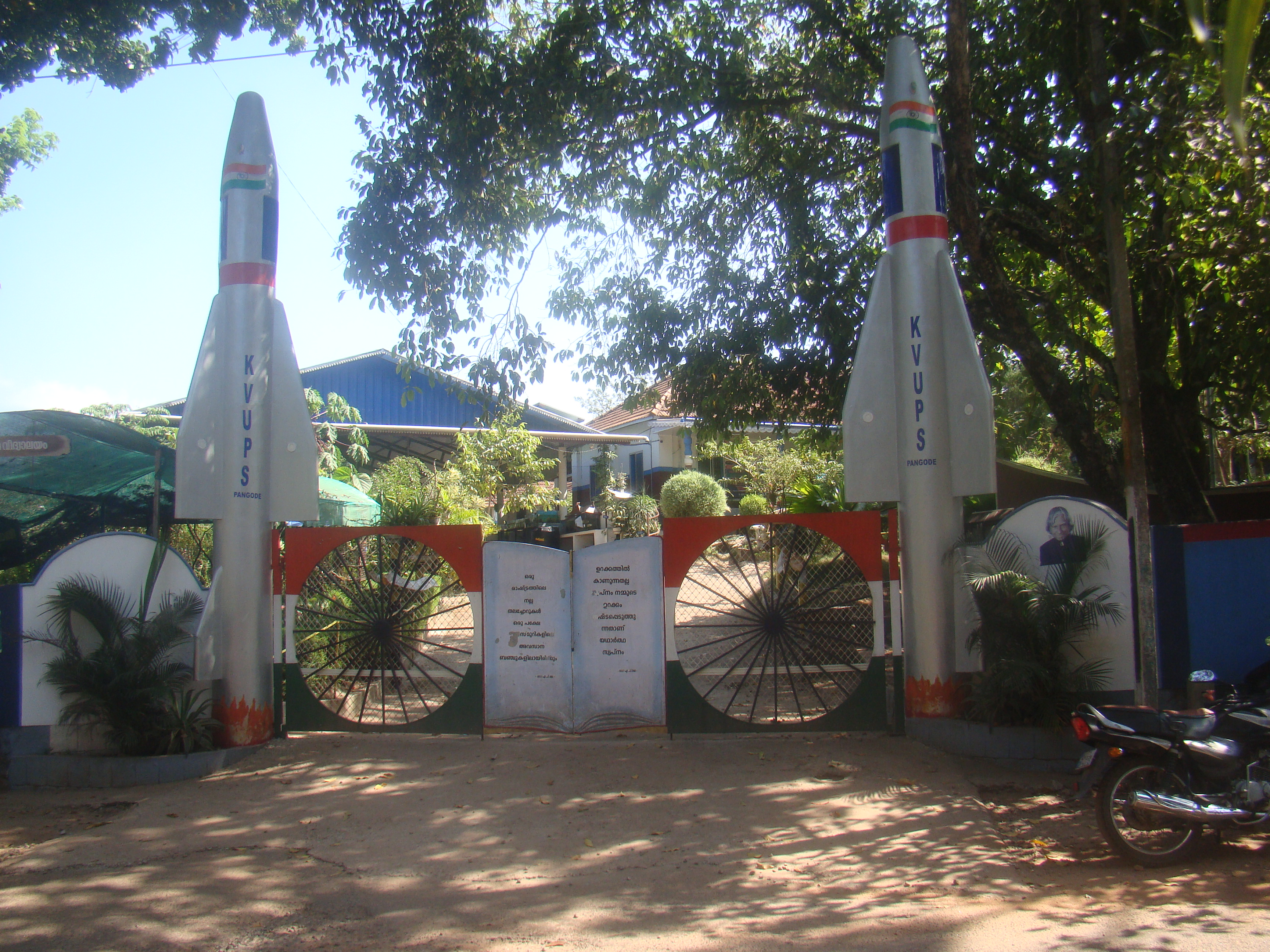 2015-ൽ പണിത അബ്ദുൽകലാം മെമ്മോറിയൽ ഗേറ്റ് ആണ് സ്കൂളിനു മുൻ വശത്ത് ഉള്ളത്.